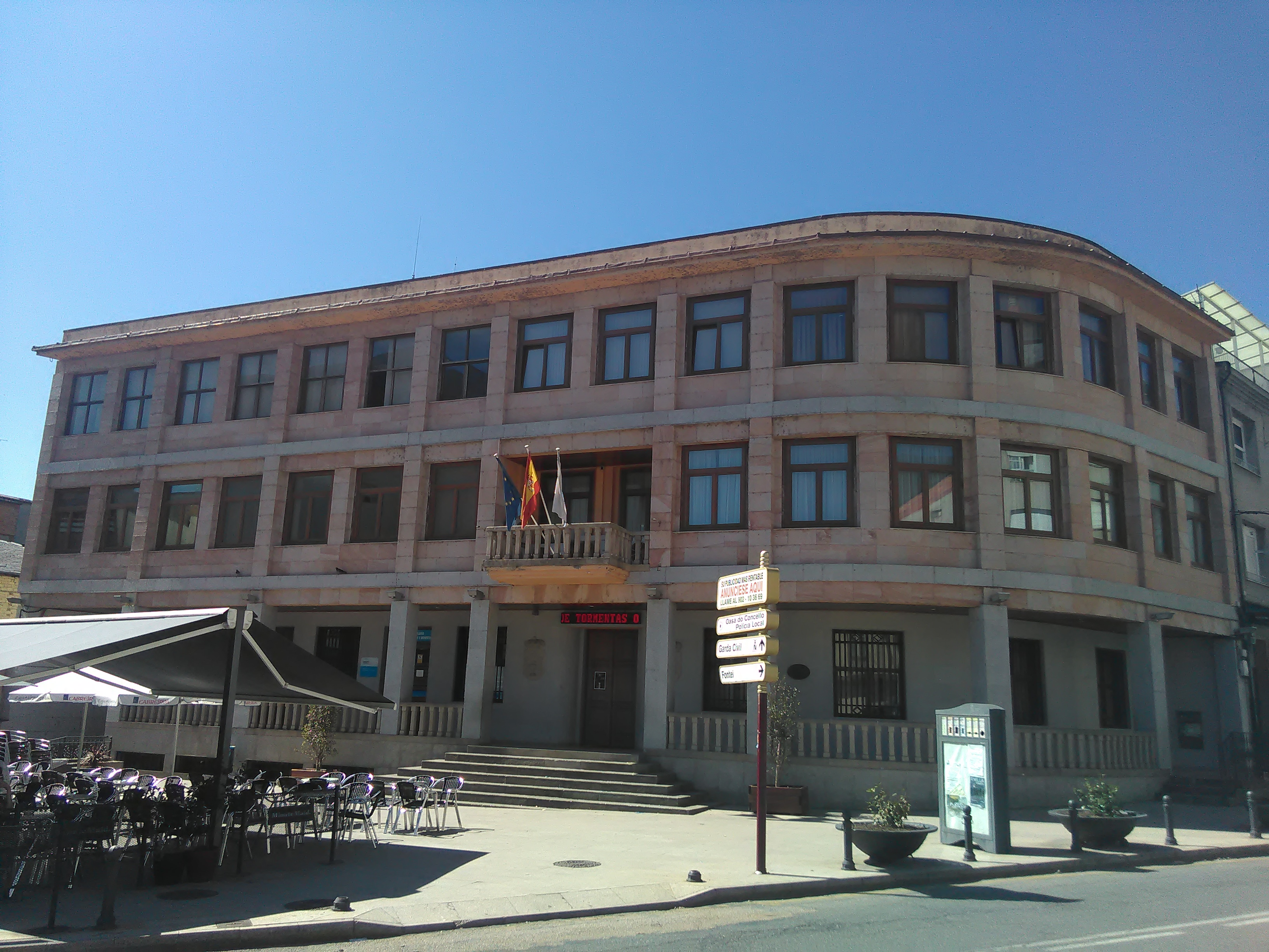 Casa do concello da Rúa, provincia de Ourense.